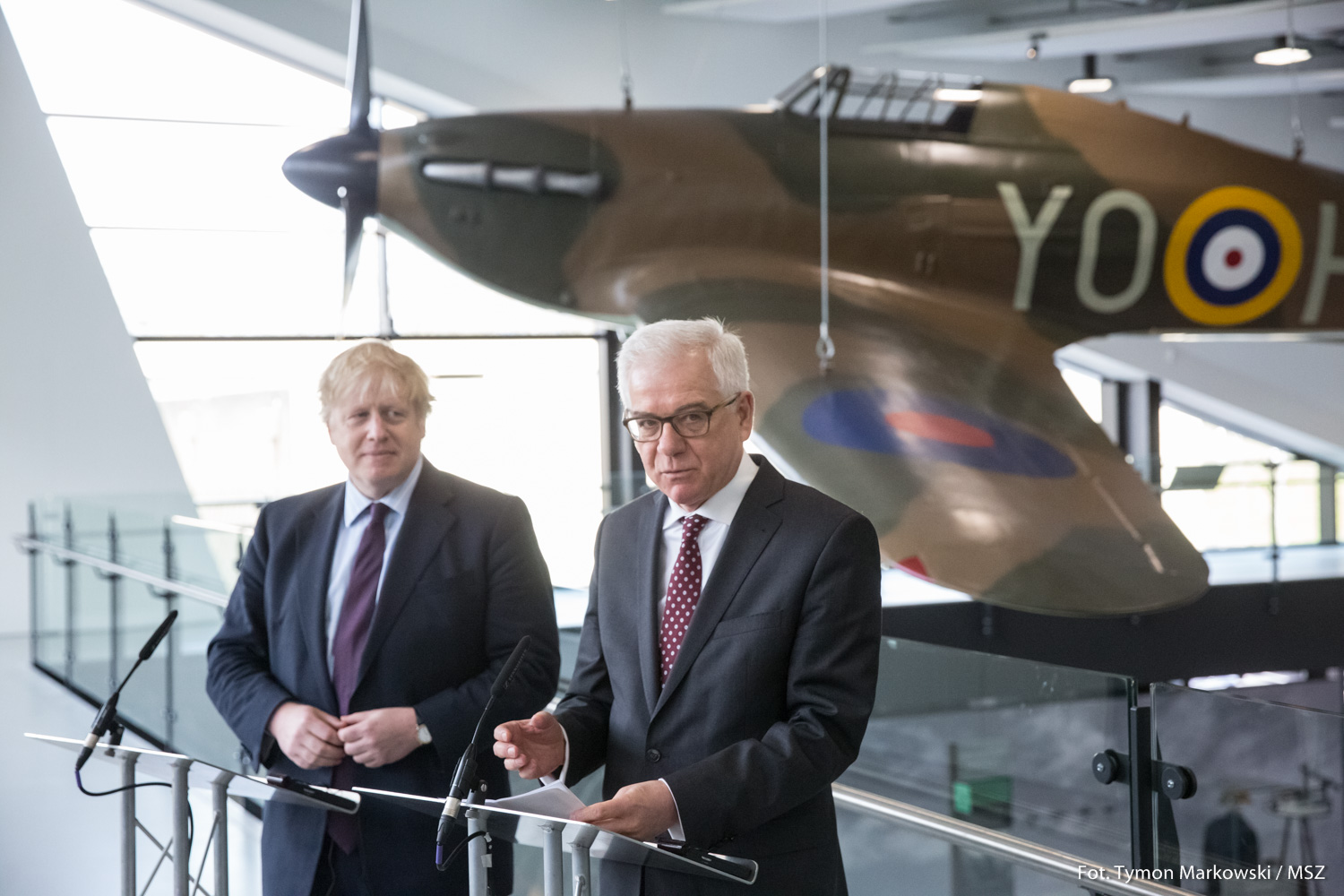 2018.03.16 Londyn , Wielka Brytania . Minister Jacek Czaputowicz . Delegacja zagraniczna do Wielkiej Brytanii . Britain Bunker . Konferencja prasowa z Boris Johnson . Fot. Tymon Markowski / MSZ